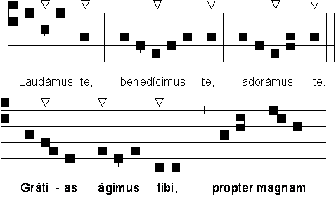 Inanité des épisèmes verticaux : Exemple de passage du Gloria X entièrement rythmé à contre-temps